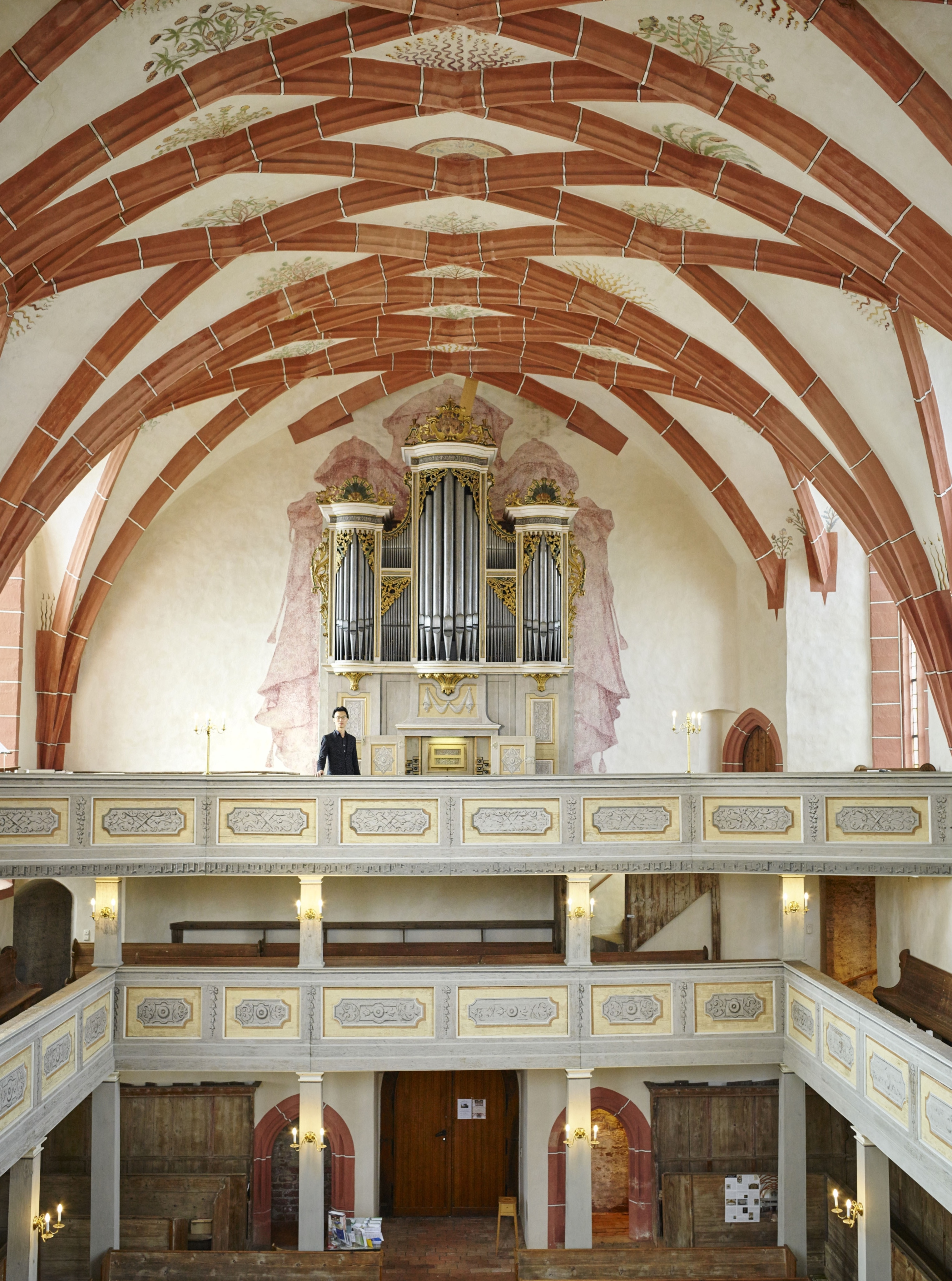 한국어 (조선): 뢰타 마리아교회 질버만오르간 1722년 제작